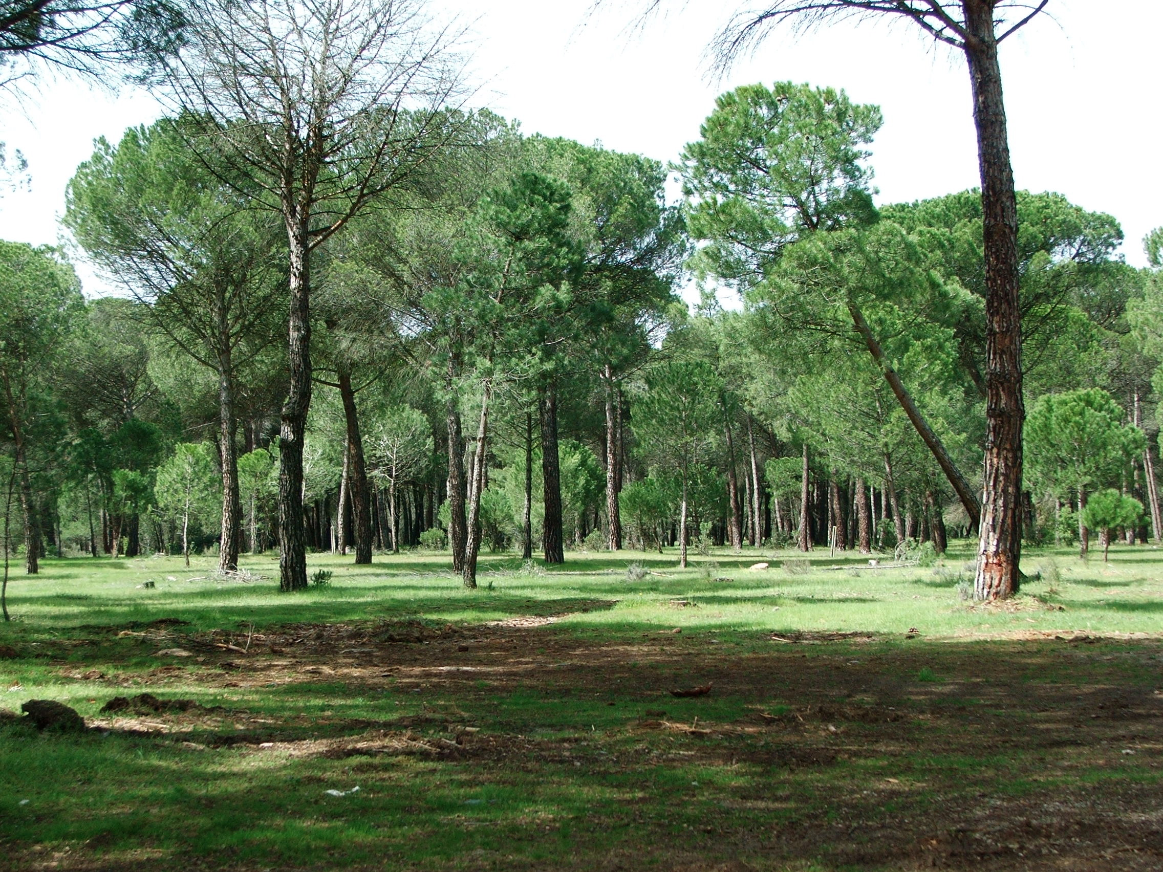 Imagen de un pinar en Tudela de Duero (España)